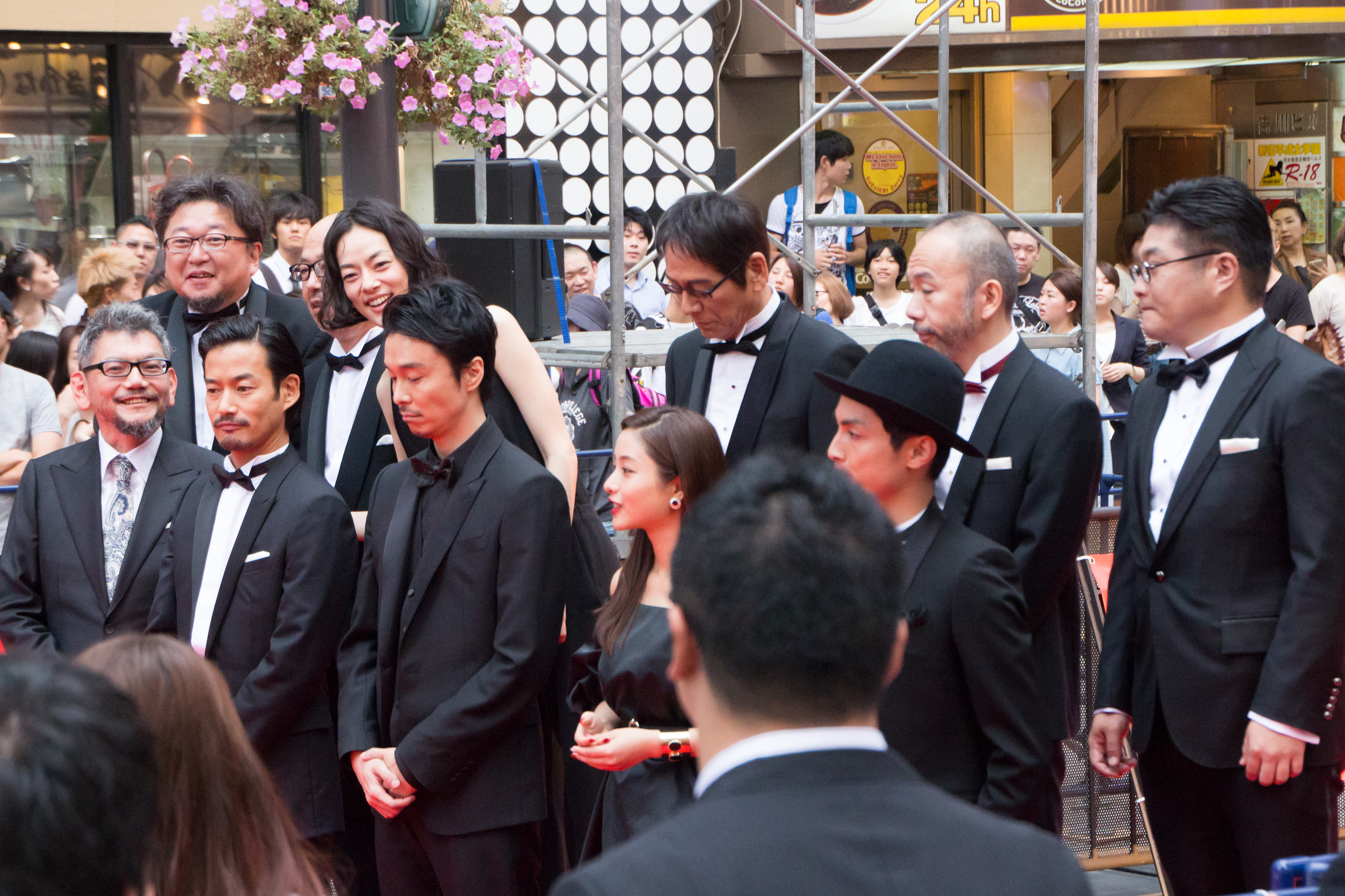 シン・ゴジラ ワールドプレミア レッドカーペットイベント 長谷川博己 竹野内豊 石原さとみ 高良健吾 松尾諭 市川実日子 大杉漣 塚本晋也 庵野秀明 樋口真嗣 尾上克郎